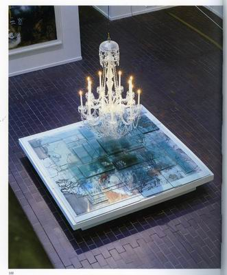 Installation